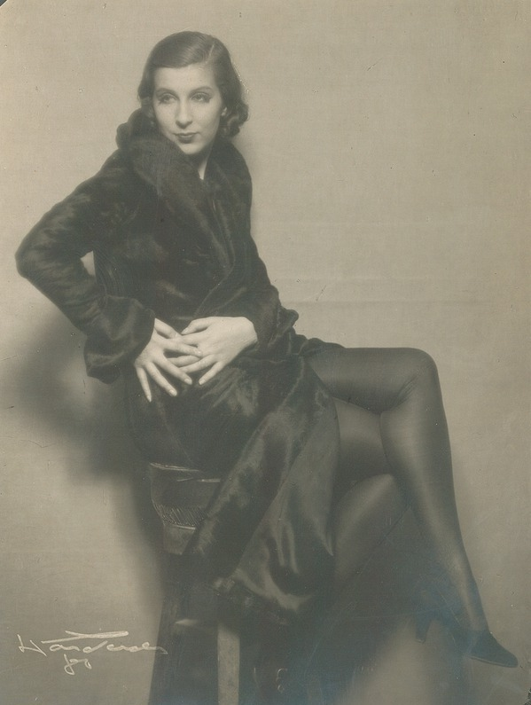 Norsk (bokmål): portrett, kvinne, revyartist, filmskuespillerinne, sittende helfigur.